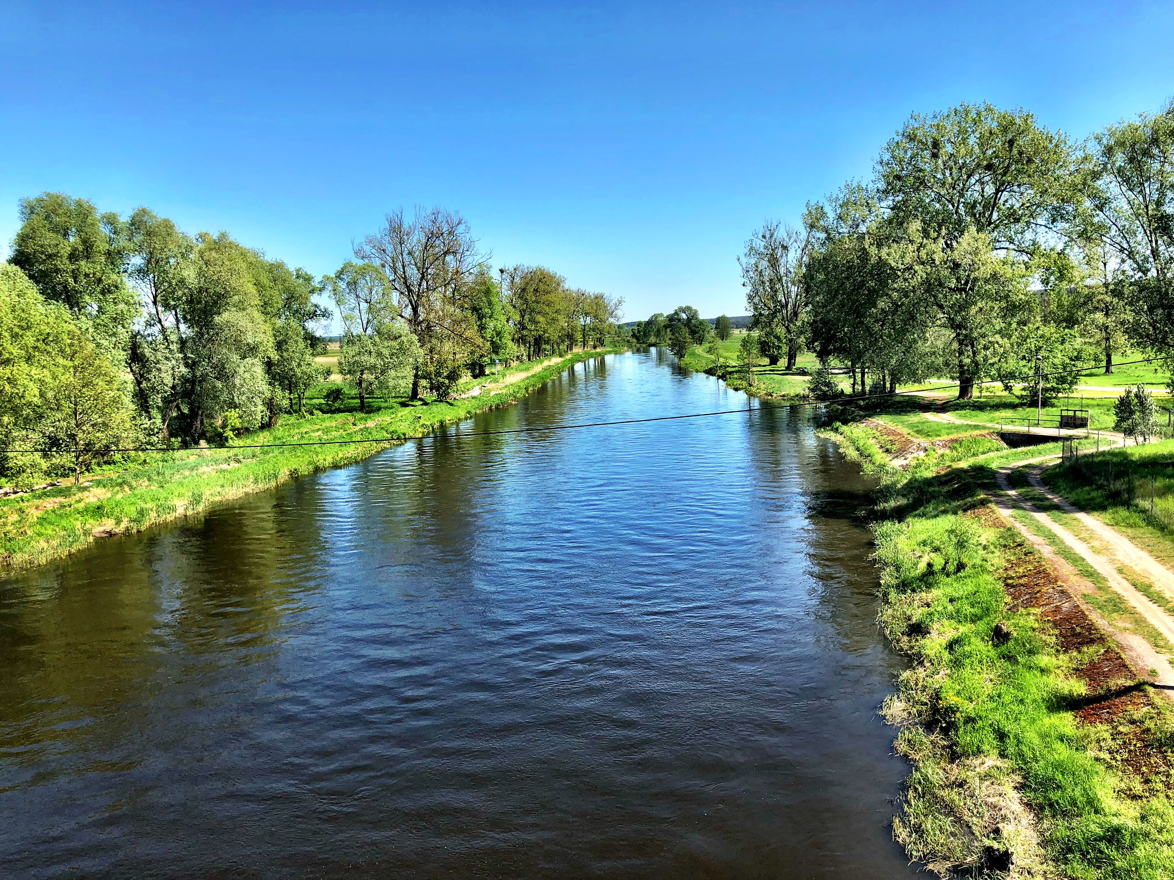 Rzeka Noteć widziana z mostu w Czarnkowie (w kierunku wschodnim)